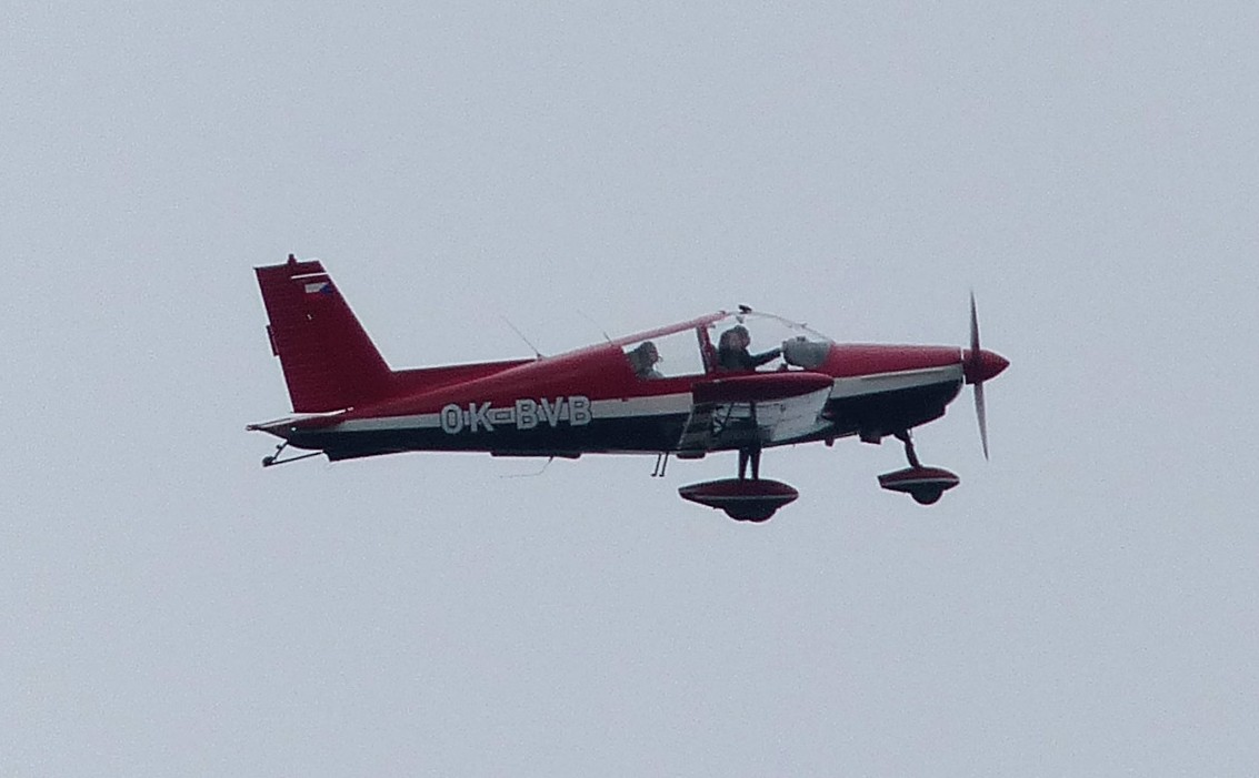 OK-BVB